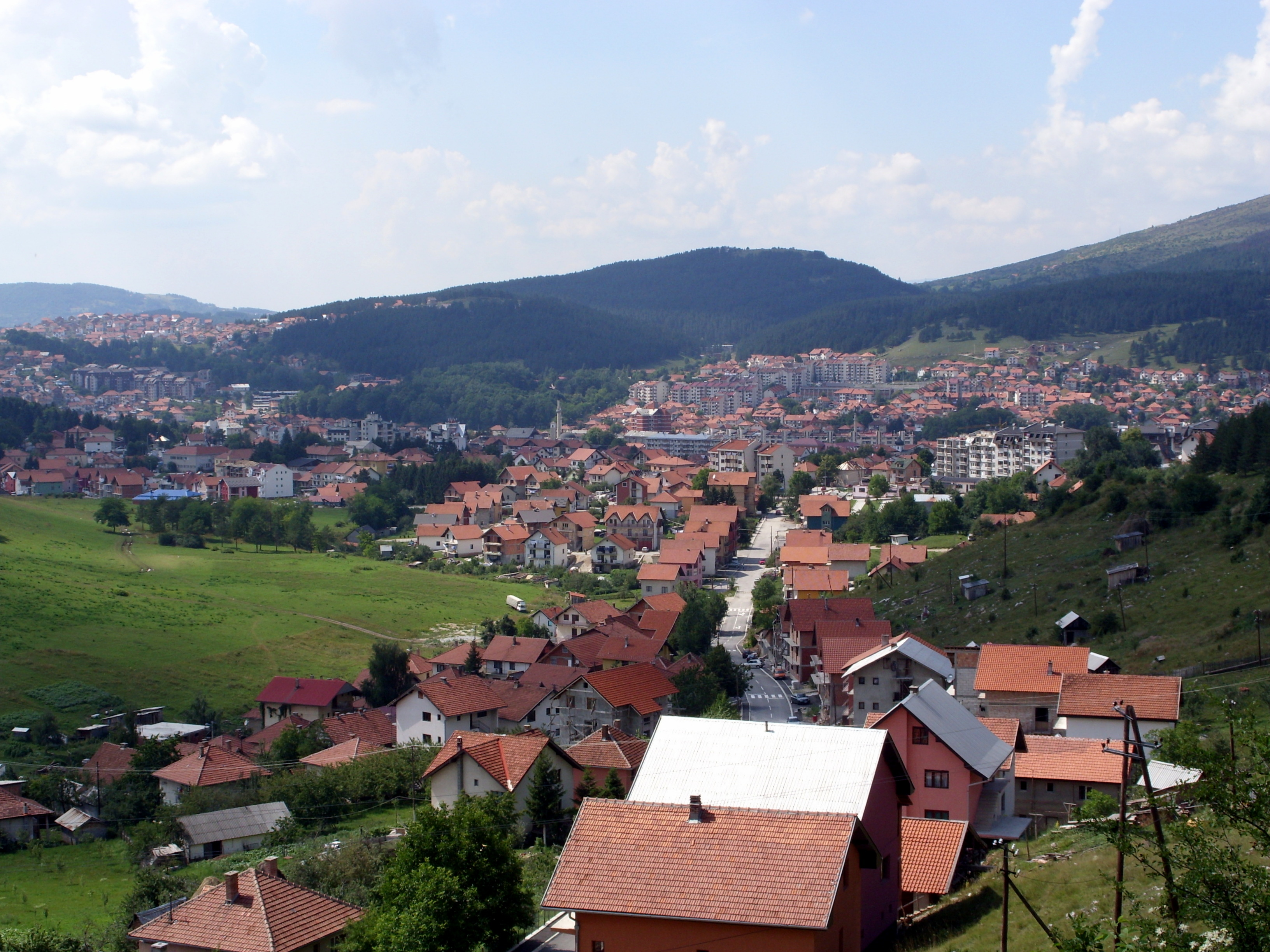 Blick auf Pljevlja, Montenegro.